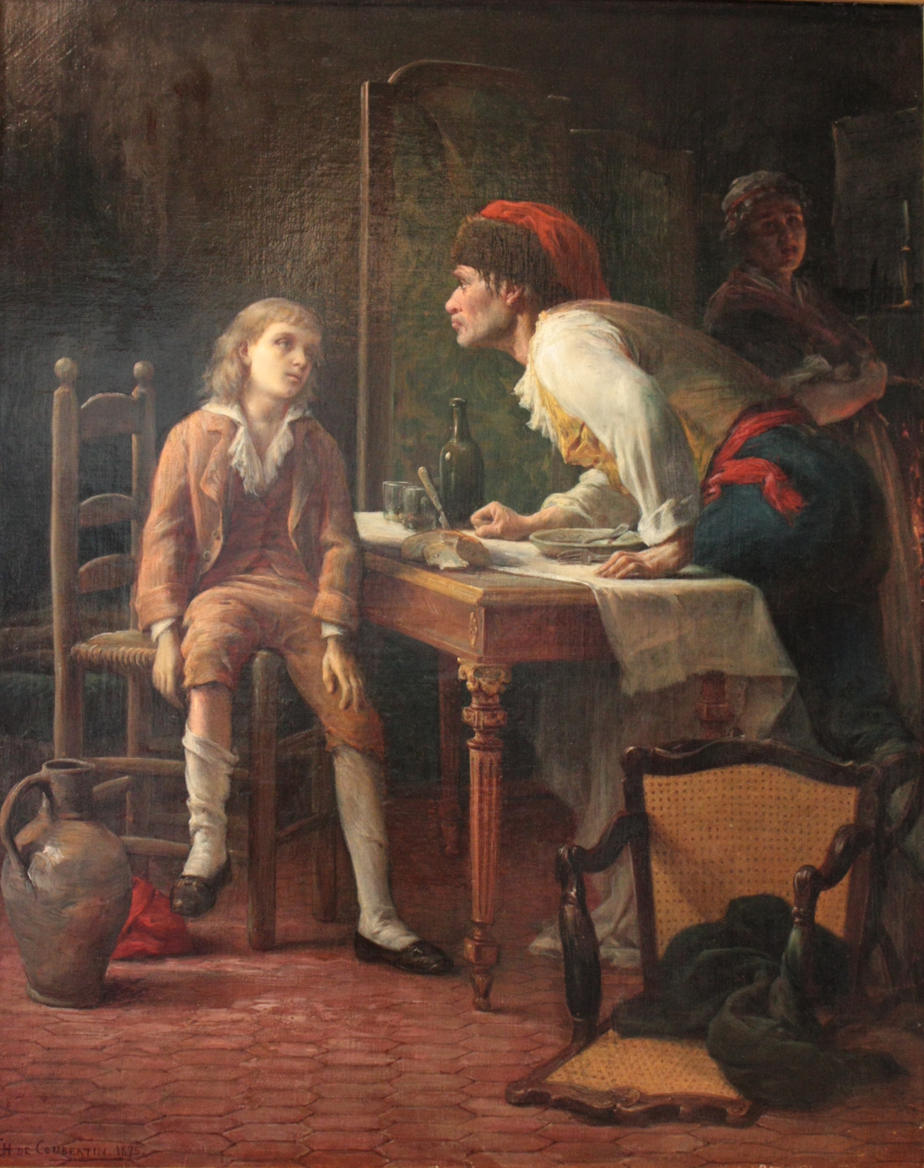 Louis XVII au Temple par Charles-Louis de Coubertin, 1875